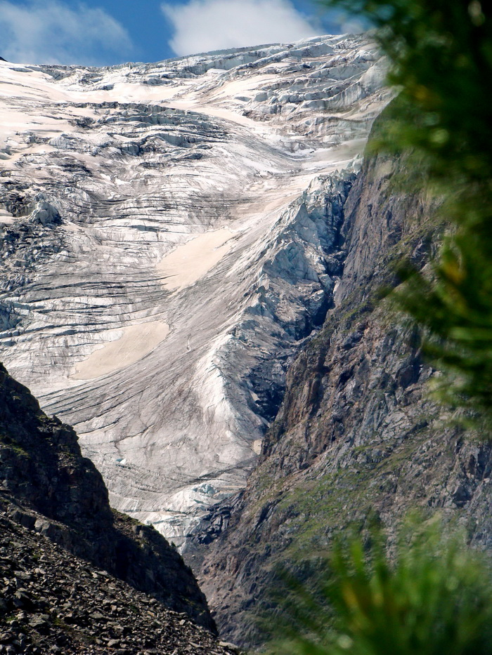 Ледопад ледника Малый Актру, Горый Алтай